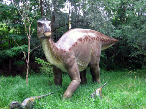 Iguanodon mit Jungtieren. Aufgenommen von Marcus Ringer im „Dinopark“ in Fürth/Bayern. Fotografieren und filmen ist dort erlaubt!